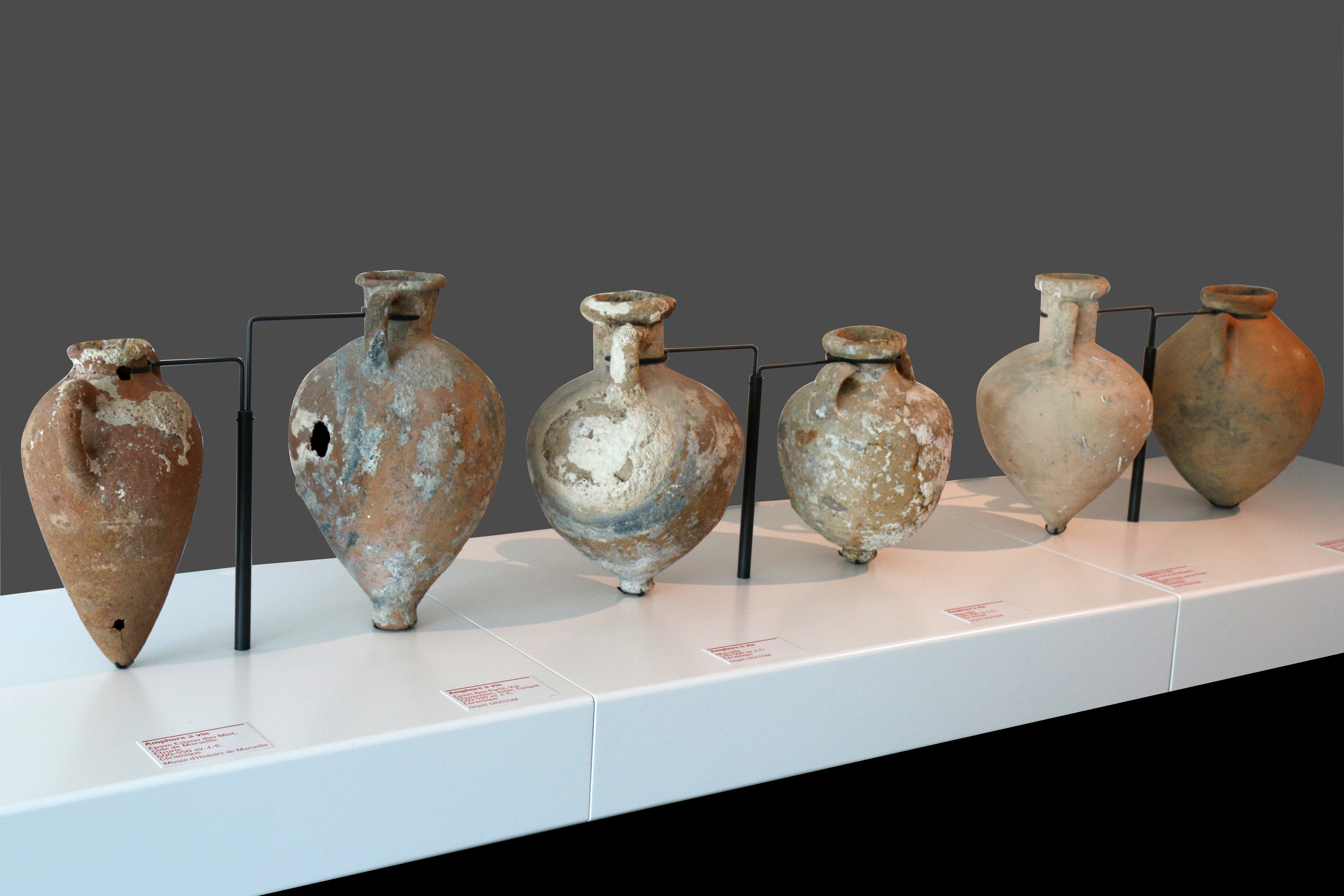 Amphores à vin, de gauche à droite : épave Esteou dou Miet, origine Etrurie, vers 600/550 av. J.-C. épave Bon Porté, origine Clazomènes, vers 540/510 av. J.-C. Marseille vers 540/500 av. J.-C. Marseille vers 500/400 av. J.-C. épave du grand Ribaud (Var), origine sud de l'Italie, vers 500 av. J.-C. épave du grand Ribaud (Var), origine Etrurie, vers 500 av. J.-C.